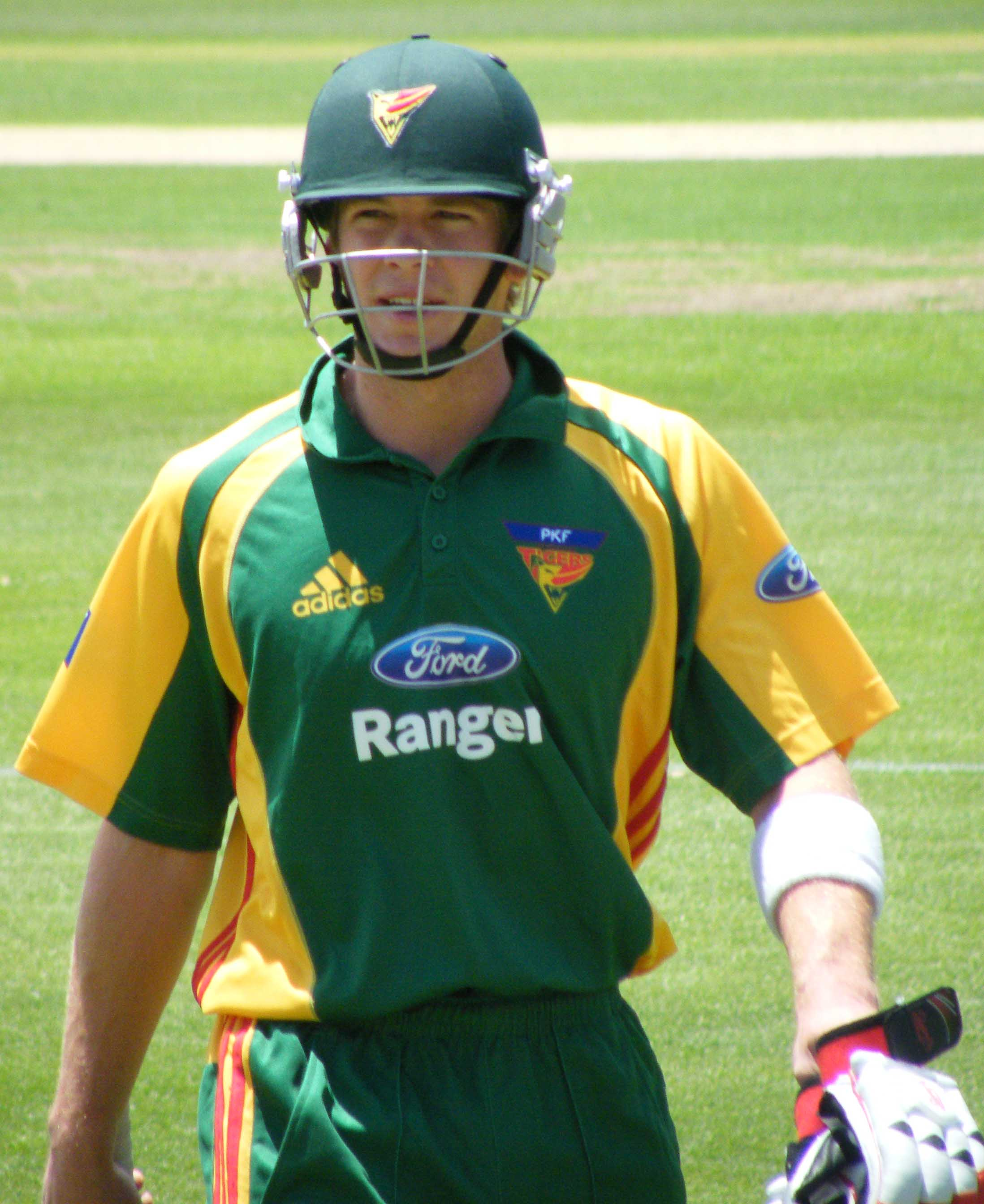 Tim Paine